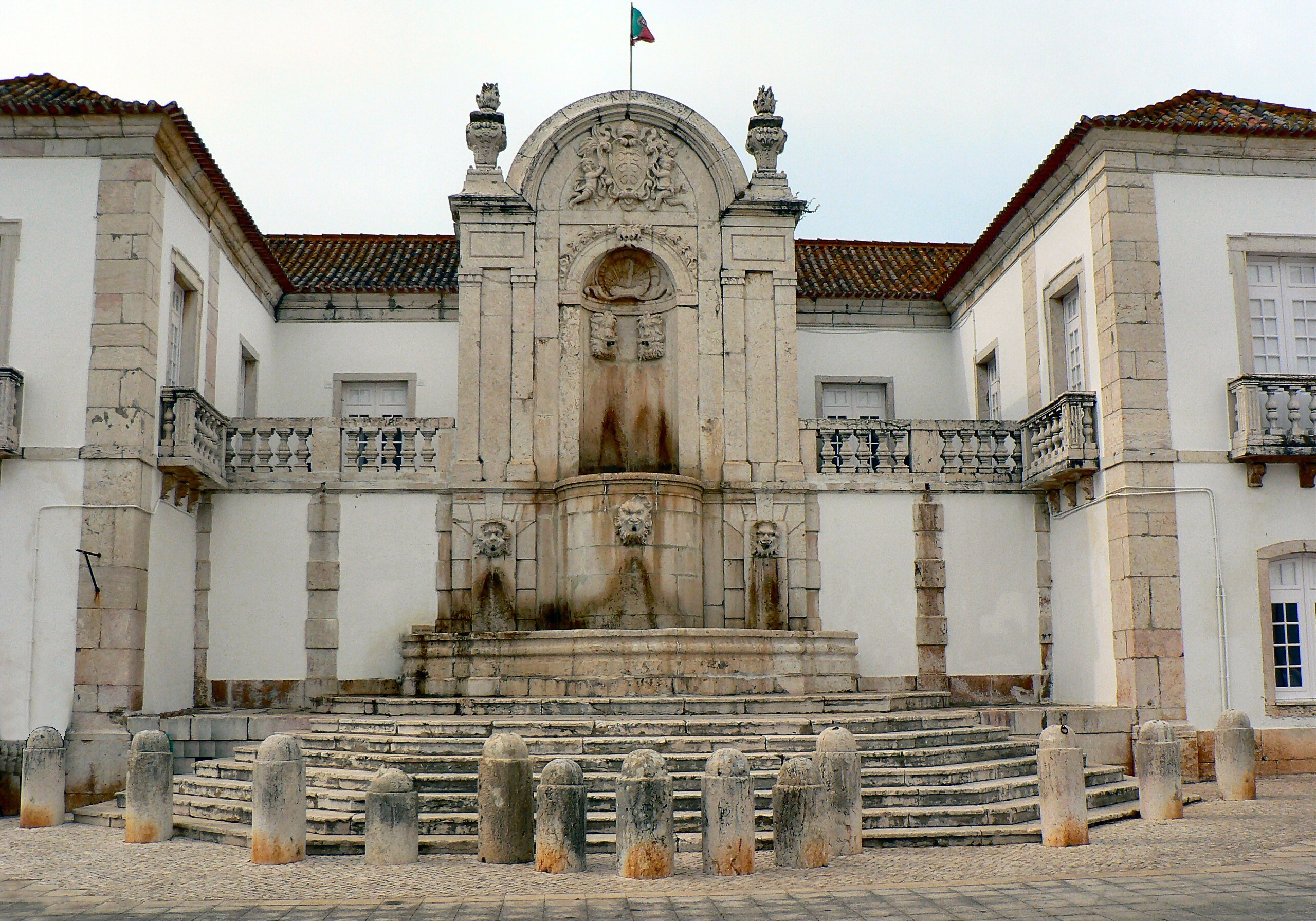 Aqueduto de Santo Antão do Tojal